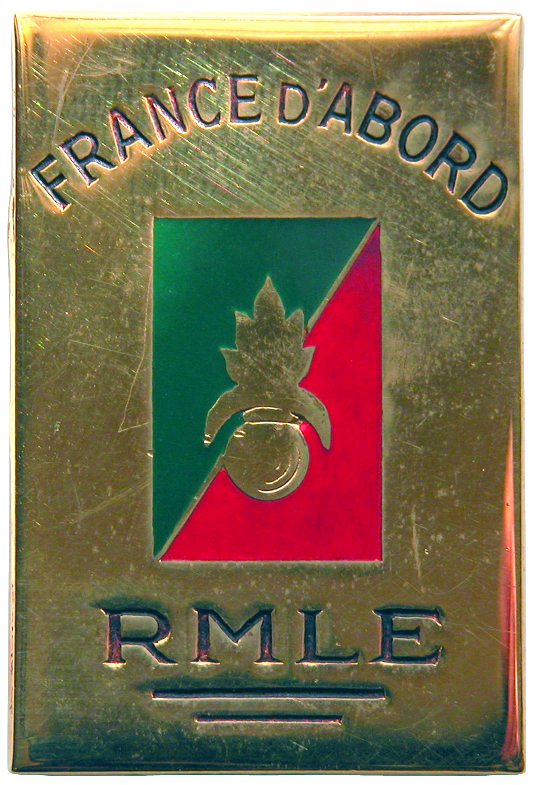 insigne régimentaire du RMLE